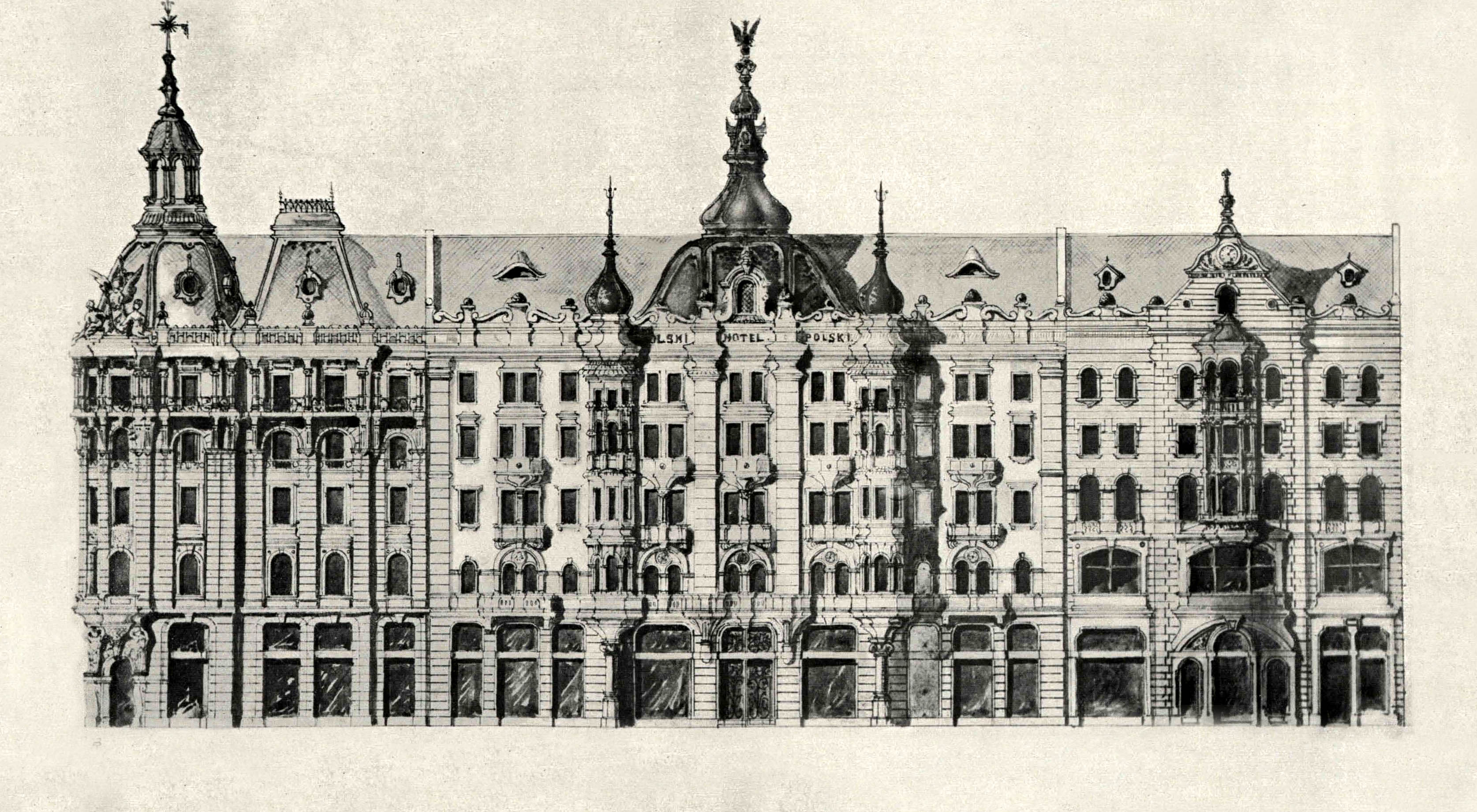 Проект будинку Кредитного земельного товариства у Львові. Архітектор Вінцент Равський-молодший (1857—1927).